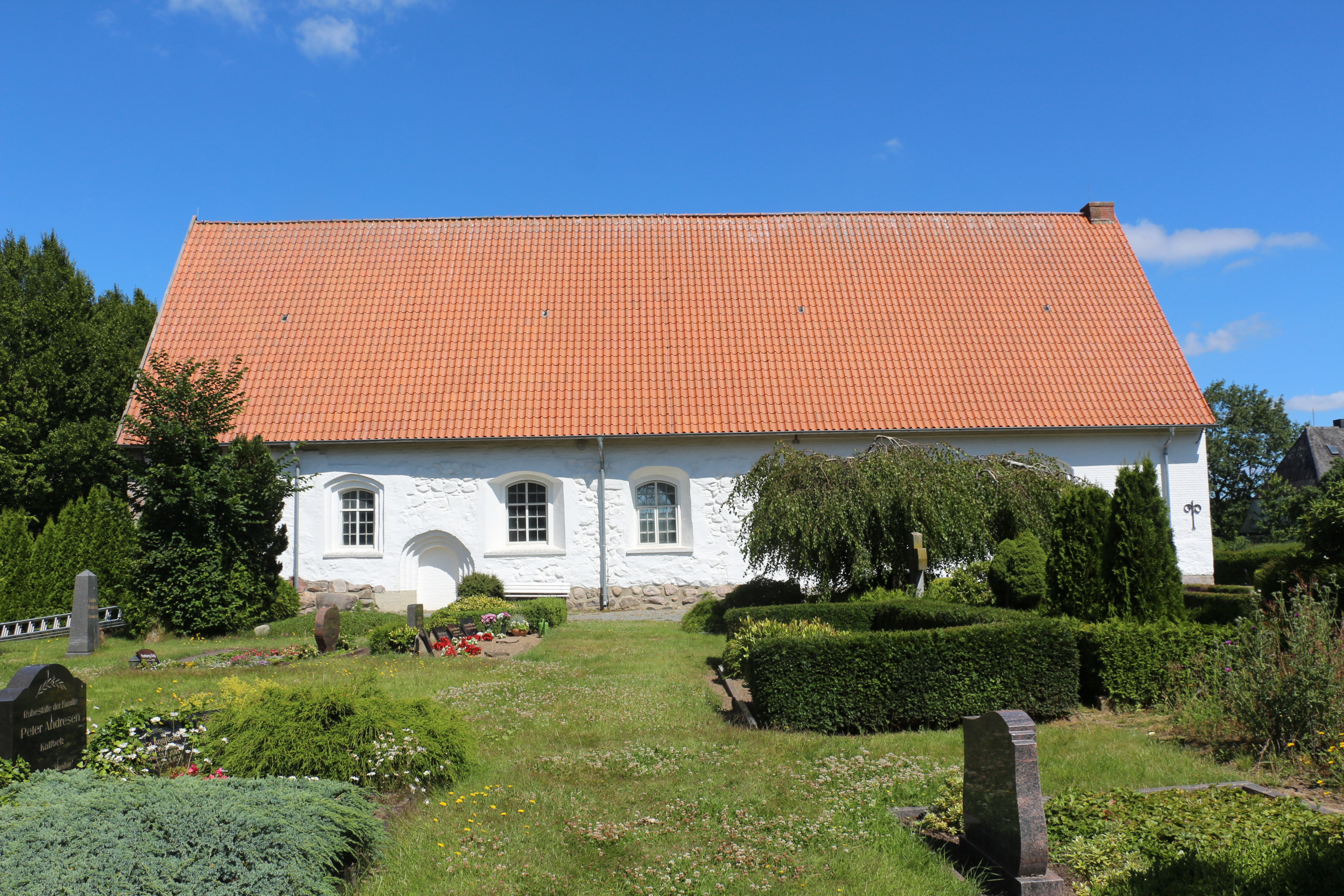 Blick von Süden auf die mittelalterliche Kirche von Kirche Fahrenstedt-Böklund